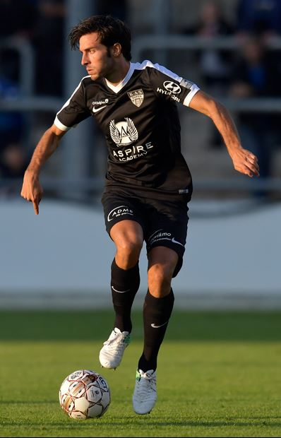 Marc Valiente (Eupen-Cologne)